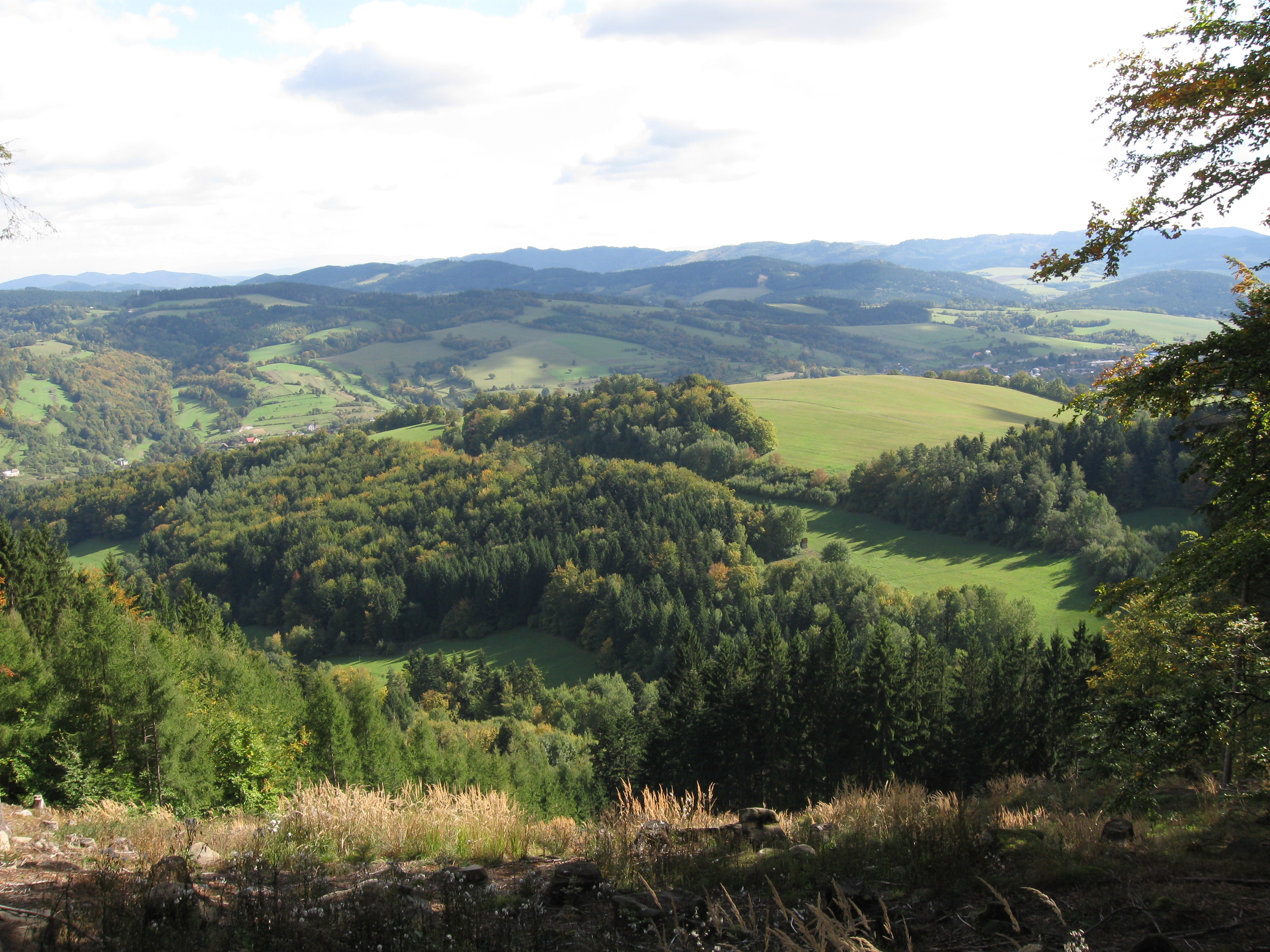 vlevo Lidečko, vpravo Horní Lideč